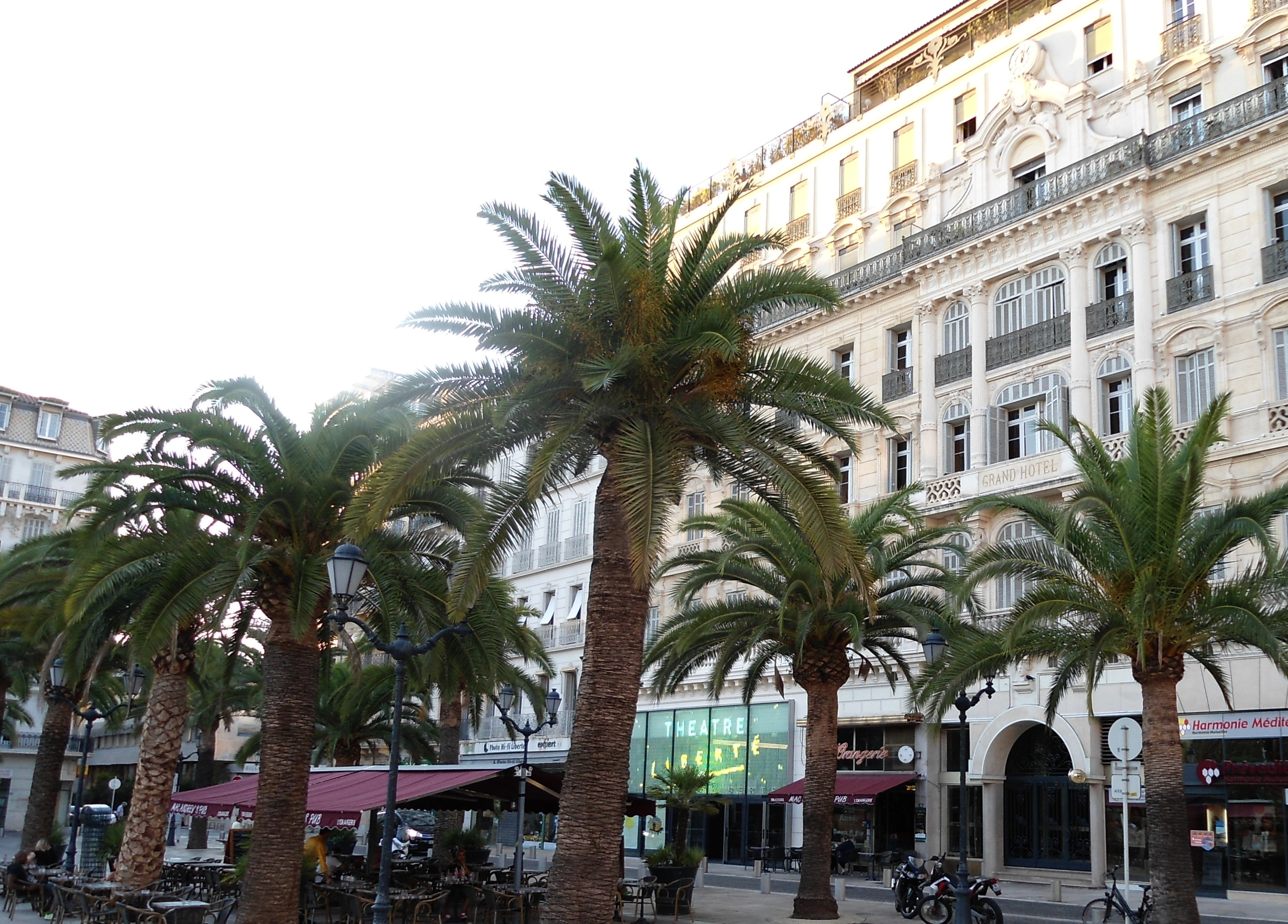 teatre Libertat, Tolon